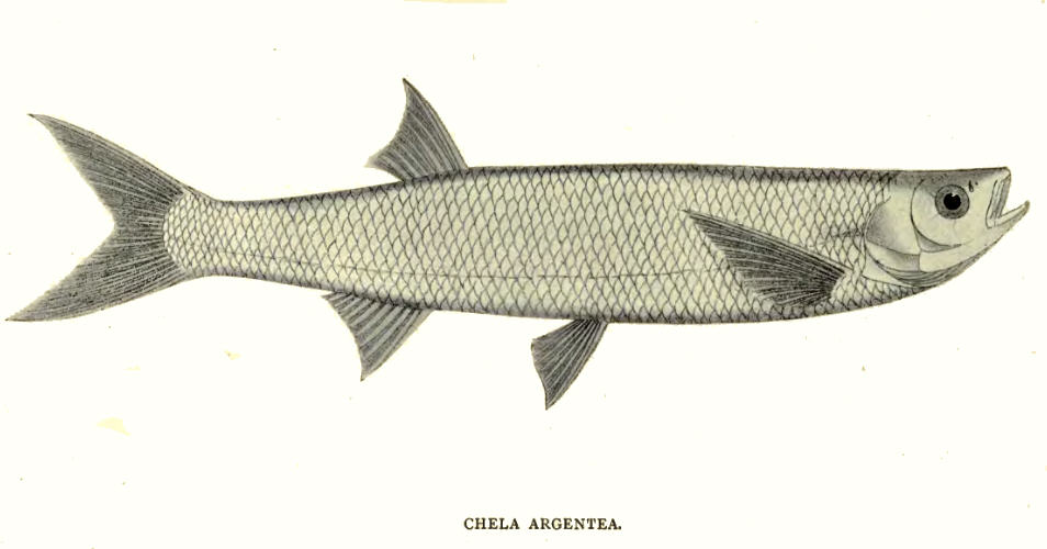 Chela argentea = Salmostoma acinaces (Valenciennes, 1844)